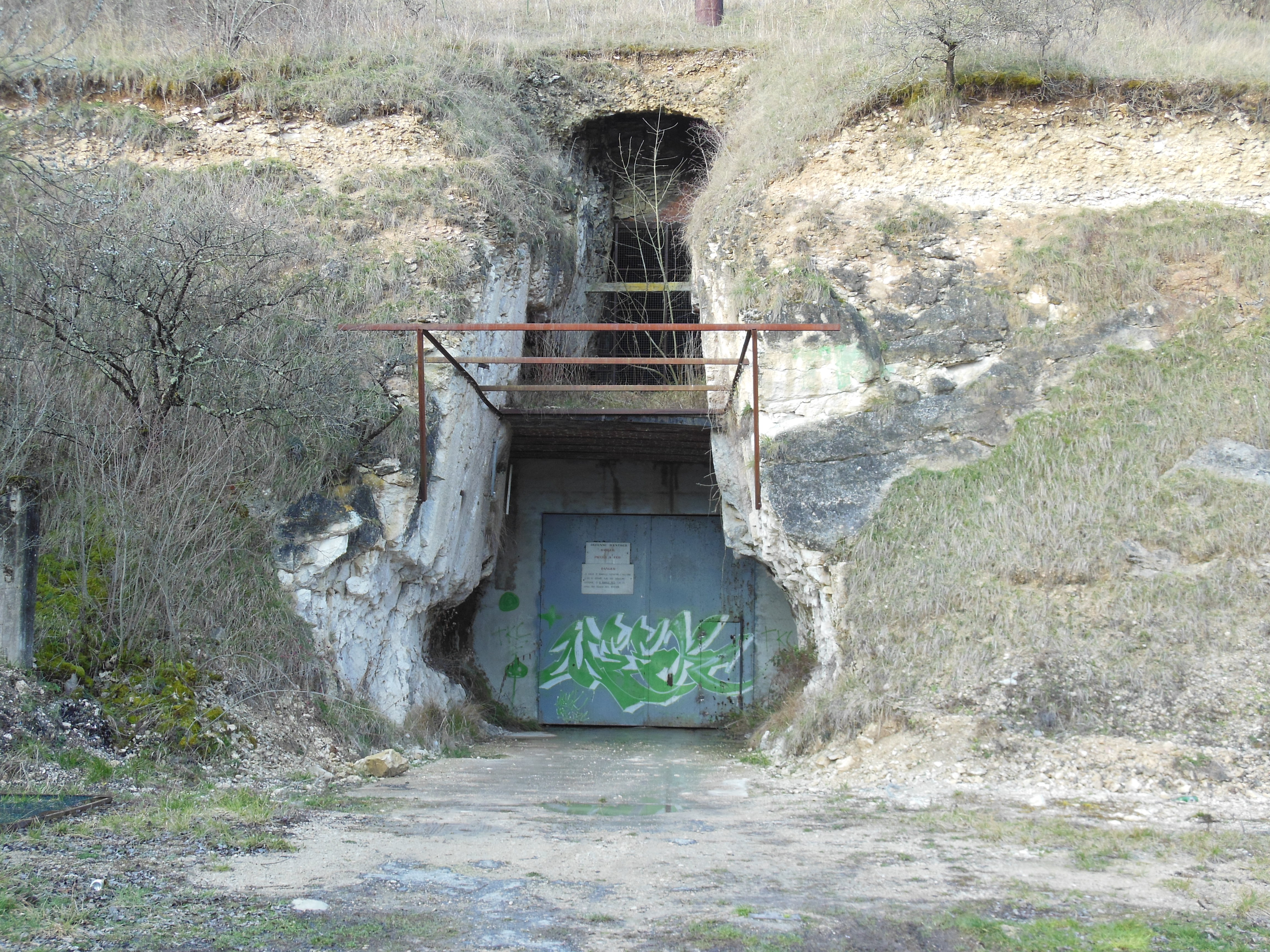 Une des entrées de l'usine aéronautique souterraine allemande de Cravant (Yonne).